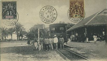 Lokomotive im Bahnhof von Ouidah, Benin